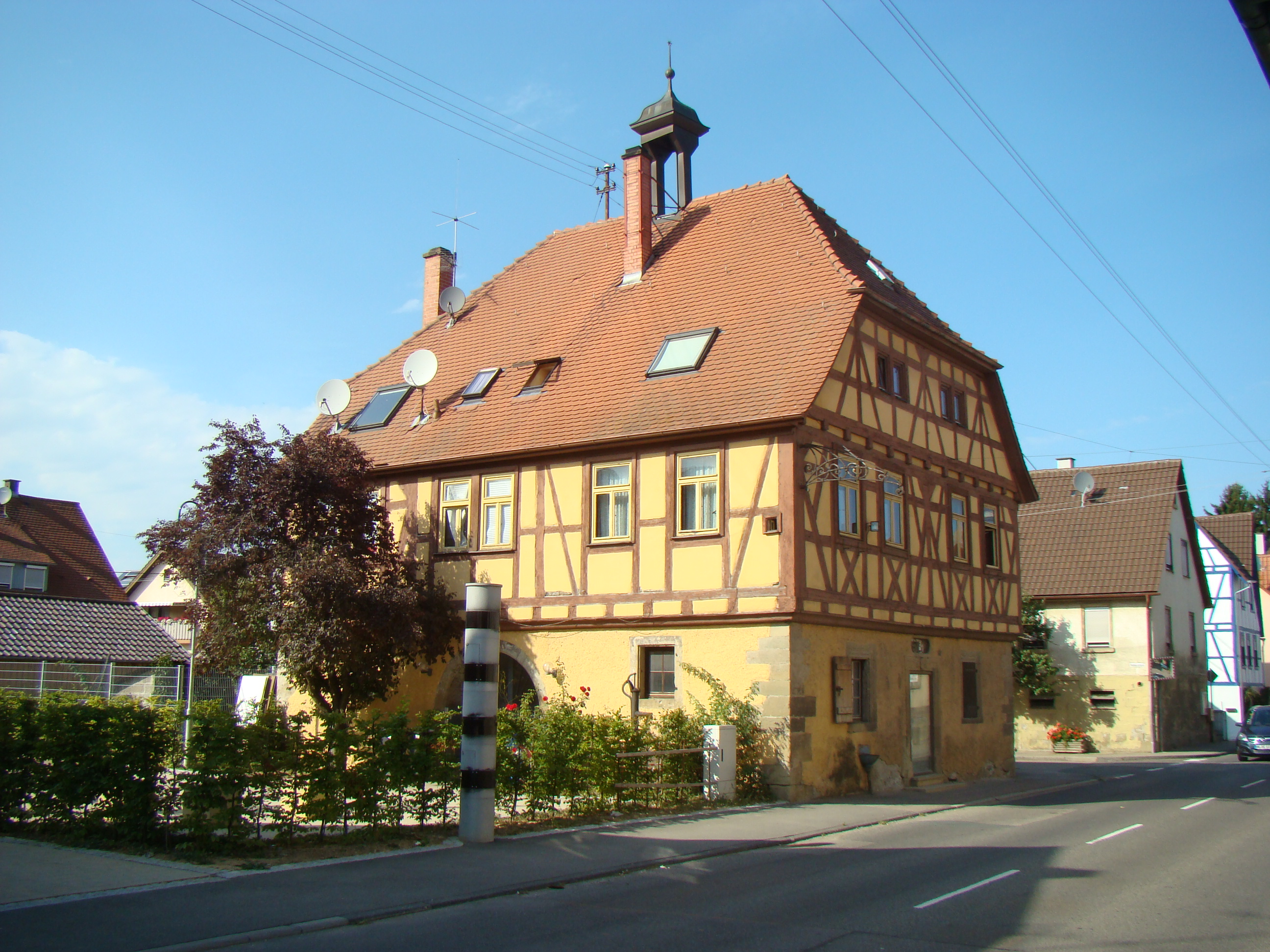 Altes Rathaus in Brackenheim-Dürrenzimmern, vgl. Fekete: Kunst- und Kulturdenkmale in Stadt- und Landkreis Heilbronn (1991, S. 126/127)